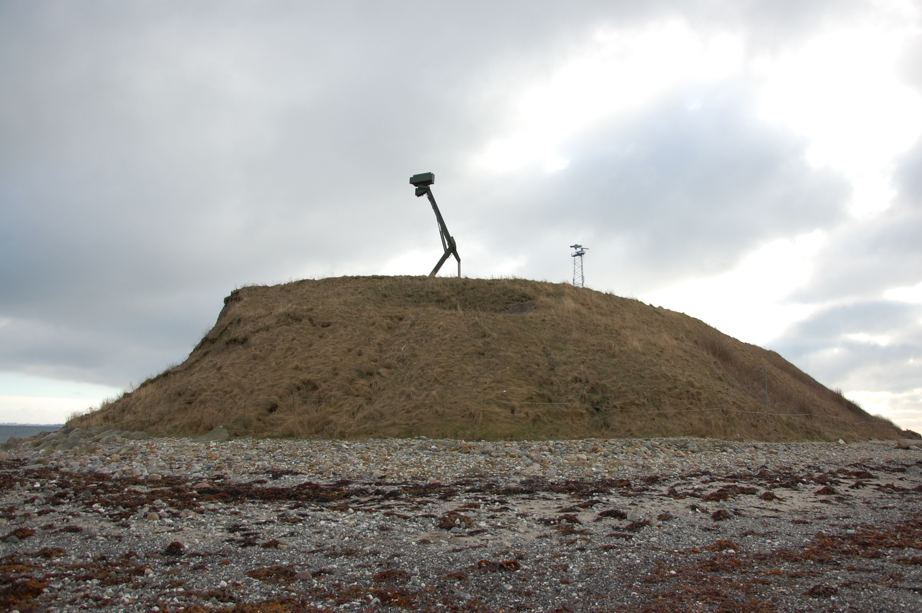 Gnibben Blick vom Strand auf die Landspitze, Einrichtungen des dänischen Militärs